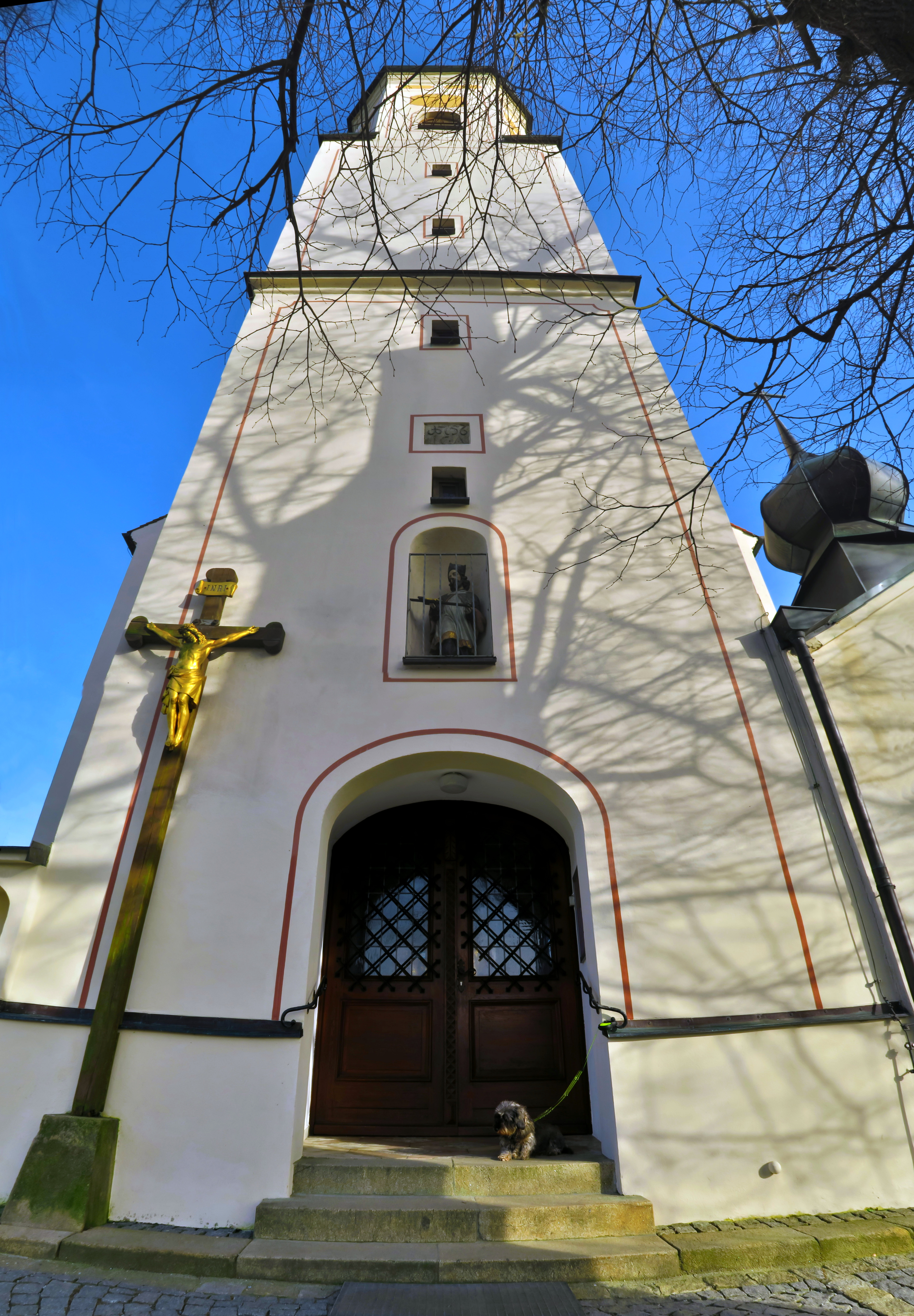 Deutschland, Bayern, Oberpfalz, Cham, Bad Kötzting, Wallfahrtskirche Mariä Himmelfahrt